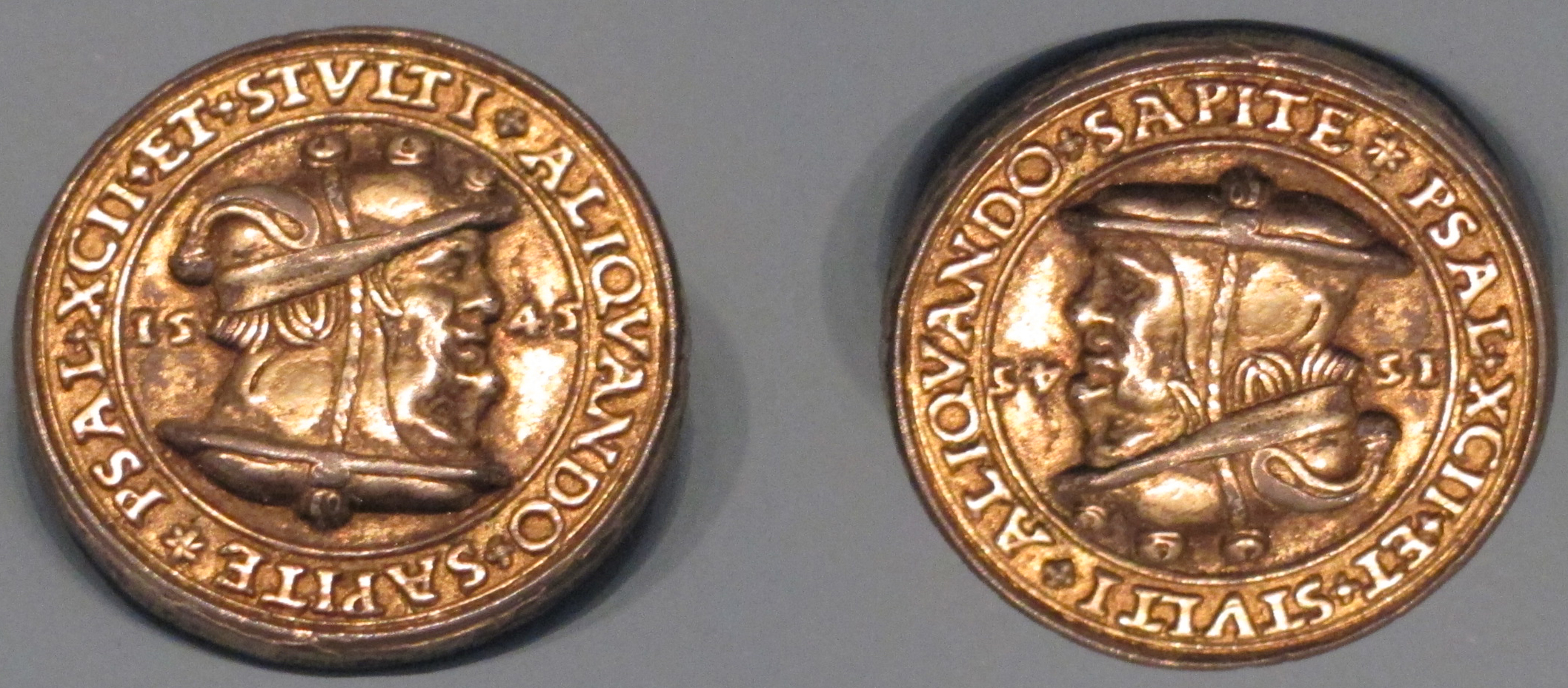 Norimberga, medaglia satirica di cardinale-giullare, 1550 ca 2